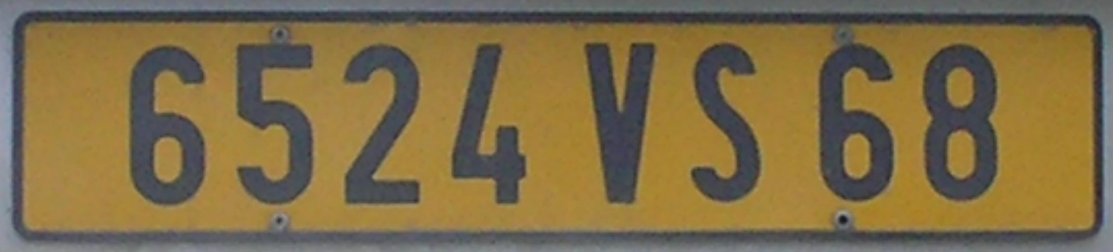 Номерний знак